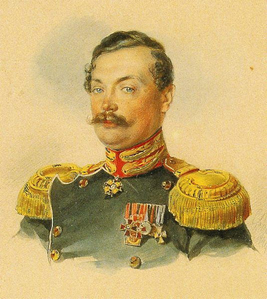 Шрейнцер Карл Матвеевич - Алексей Петрович Мусин-Пушкин (1805—1866) — генерал-майор, георгиевский кавалер, командир Преображенского полка.